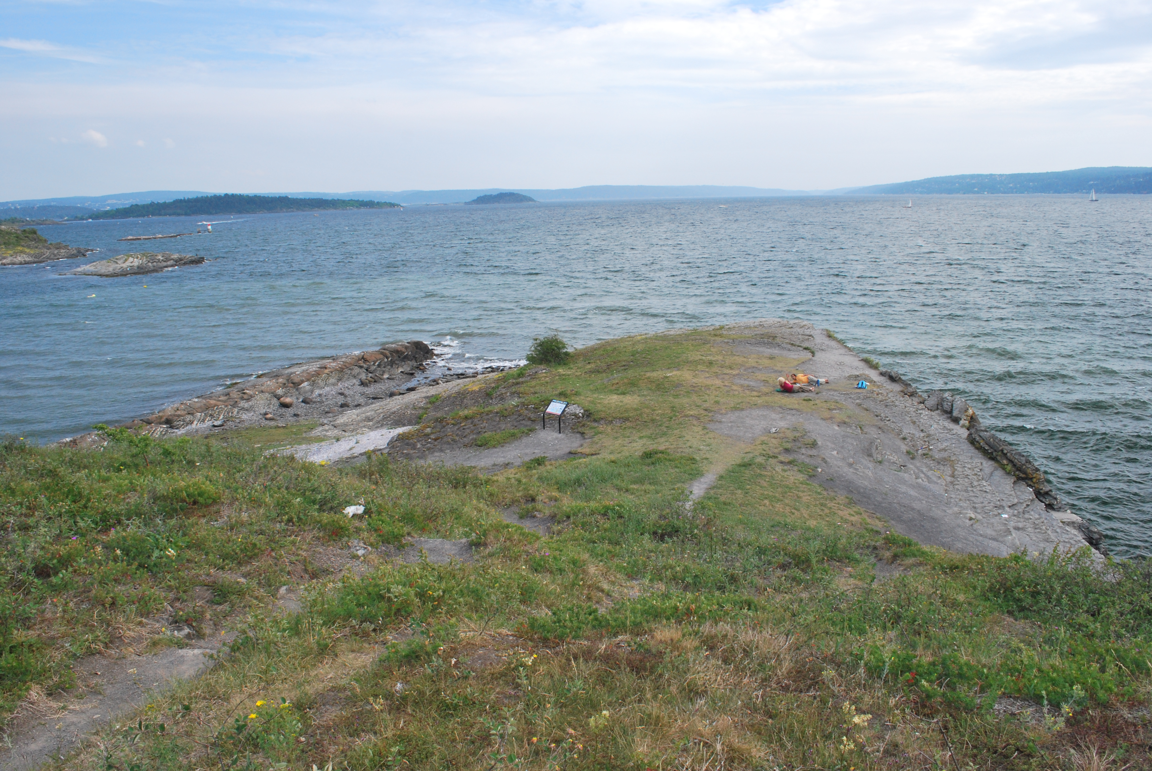 Roodden, syd på Nakholmen, Oslo